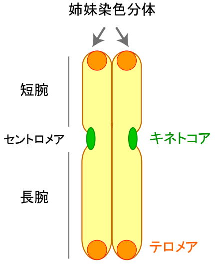 染色体模式図